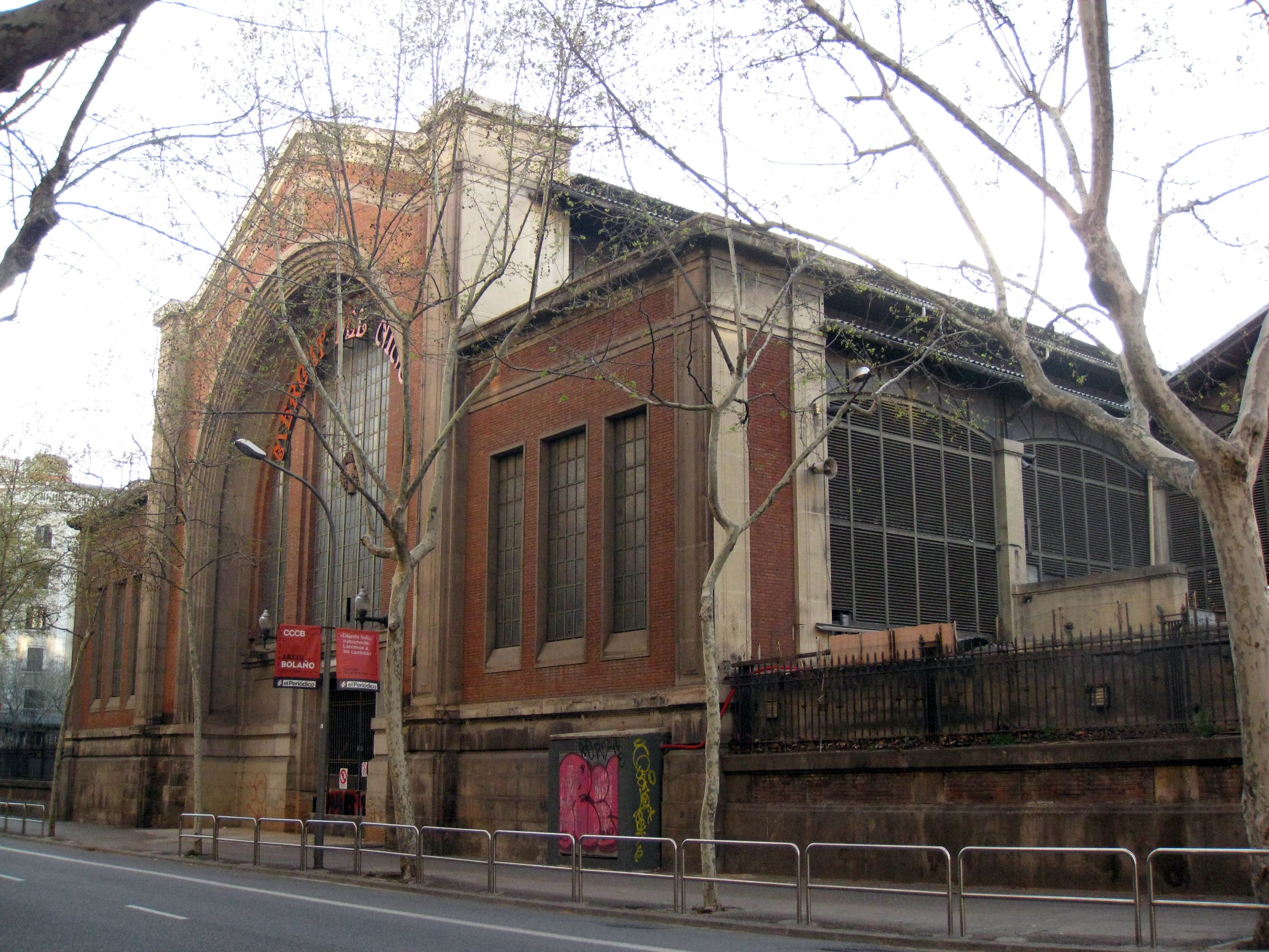 Mercat del Ninot (Barcelona) Object location41° 23′ 16.22″ N, 2° 09′ 15.93″ E The above coordinates are missing from linked Wikidata item M28333468. Click here to copy it